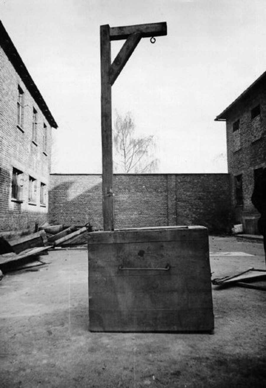 Potence mobile utilisée à Auschwitz durant la Seconde Guerre mondiale